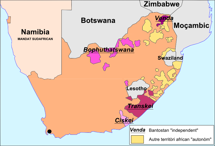 Bantostans sudafricans dins leis annadas 1980.